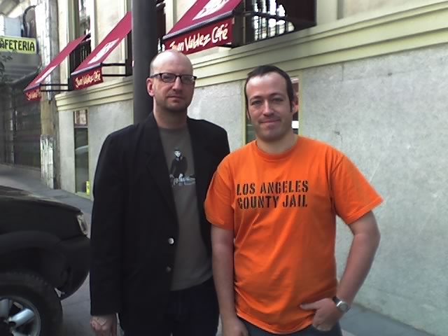 Con Steven Soderbergh en Madrid. Un encuentro fortuito...